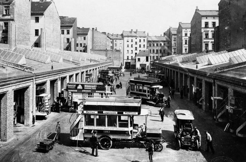 Berlin, Busdepot der ABOAG ADN-Zentralbild, Berlin im Jahre 1908, Depot für Kraftomnibusse der Allgemeinen-Berliner-Omnibus-Actien-Gesellschaft. [Scherl Bilderdienst] 8277-08 [Berlin.- Allgemeine Berliner Omnibus AG (ABOAG), Depot für Busse]